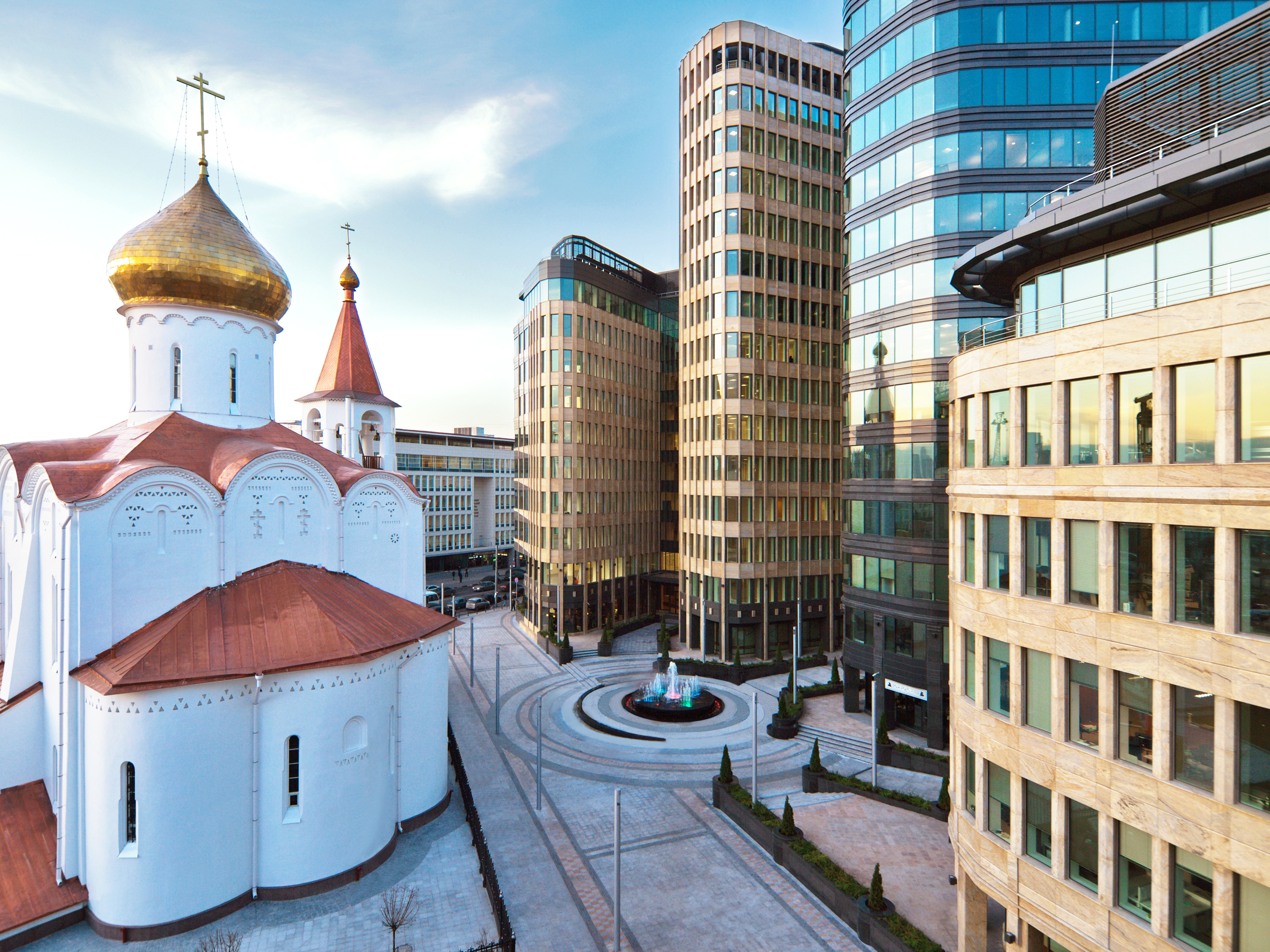 Zespół budynków biurowych w Moskwie